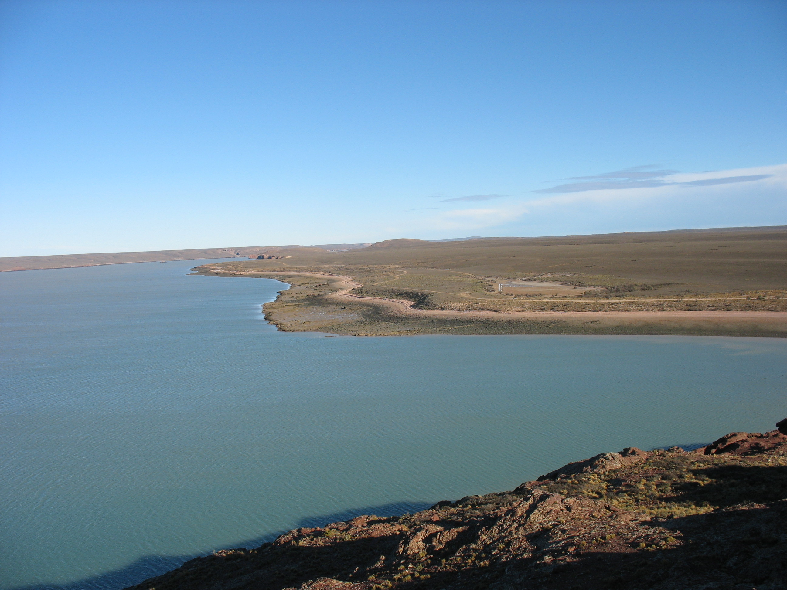 Vista de la margen norte de la ría Deseado y la bahía Uruguay desde la Península Stokes